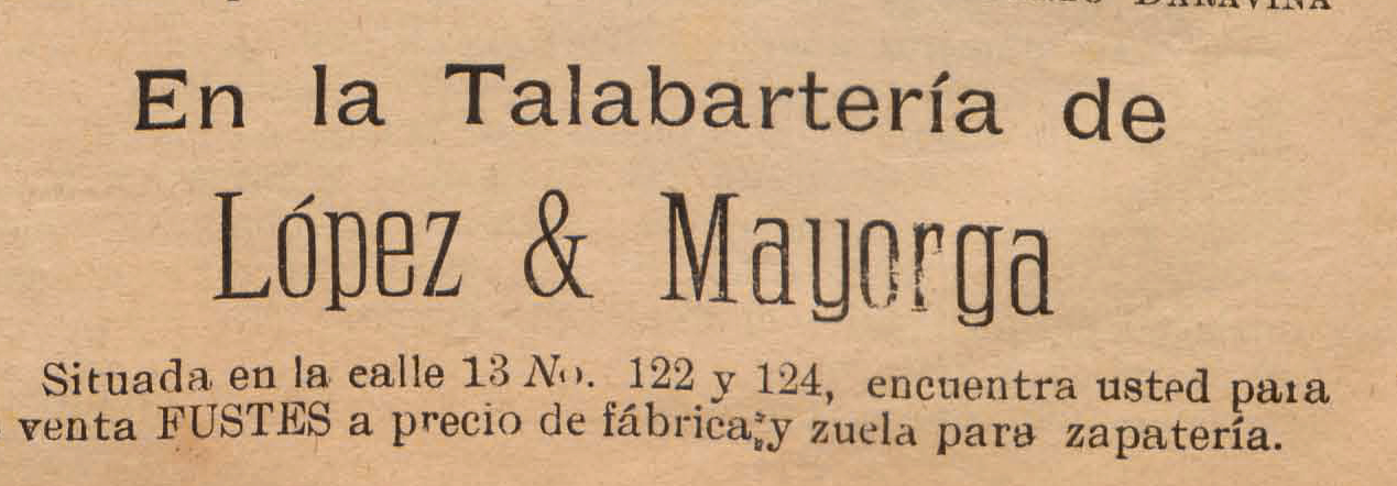 Clasificados